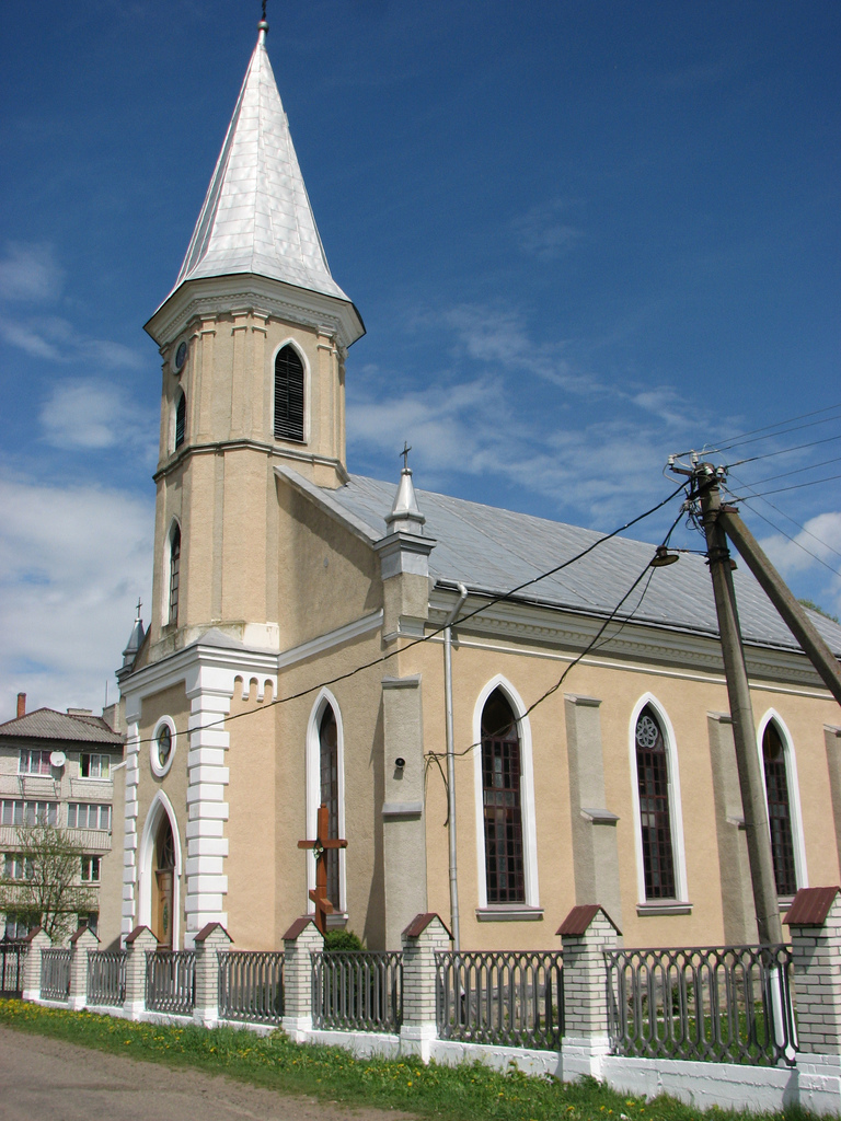 Село Ланівка - церква.